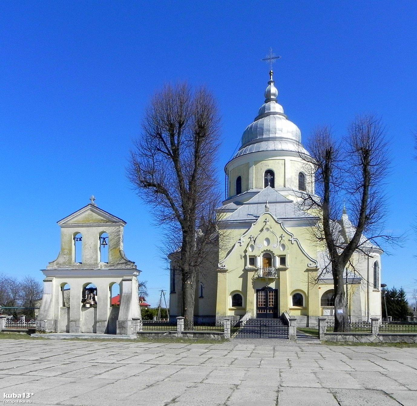 Stary Lubliniec - dawna cerkiew greckokatolicka Przemienienia Pańskiego, obecnie kościół katolicki pod tym samym wezwaniem (A-764 z 24.02.2012).